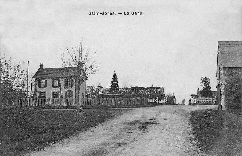 La gare de Saint-Jores sur la ligne de Carentan à Carteret.